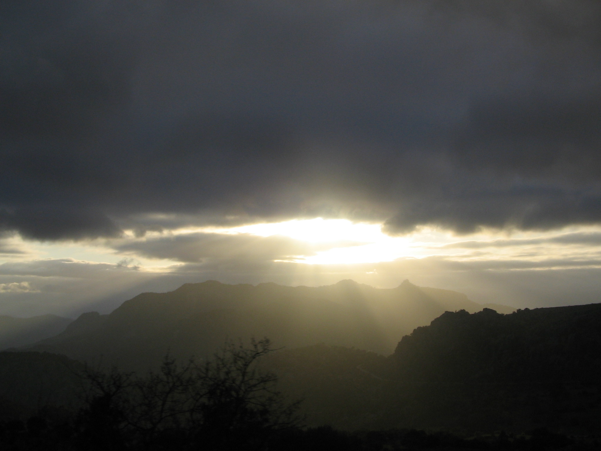 Puesta de sol en la Sierra de Grazalema (Cádiz), España.